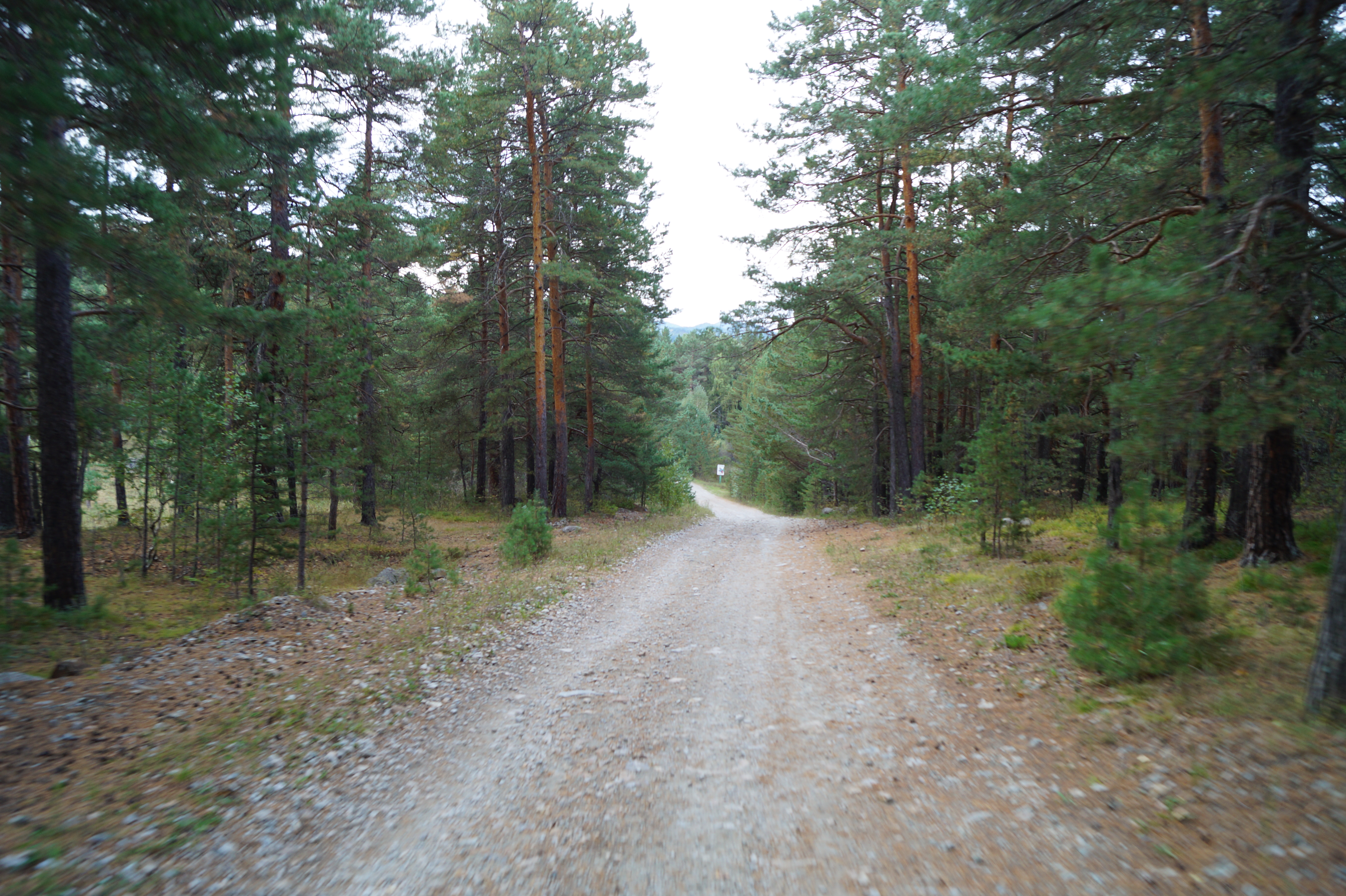 Дорога на моховое